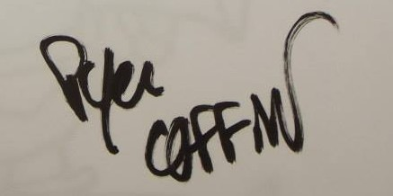 Signature de Pierre Coffin